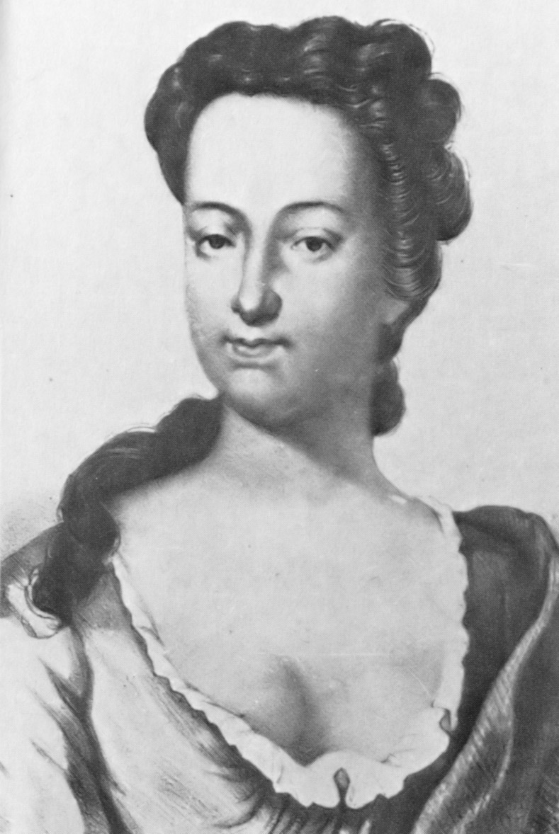 Elizabeth Blachrie Blackwell